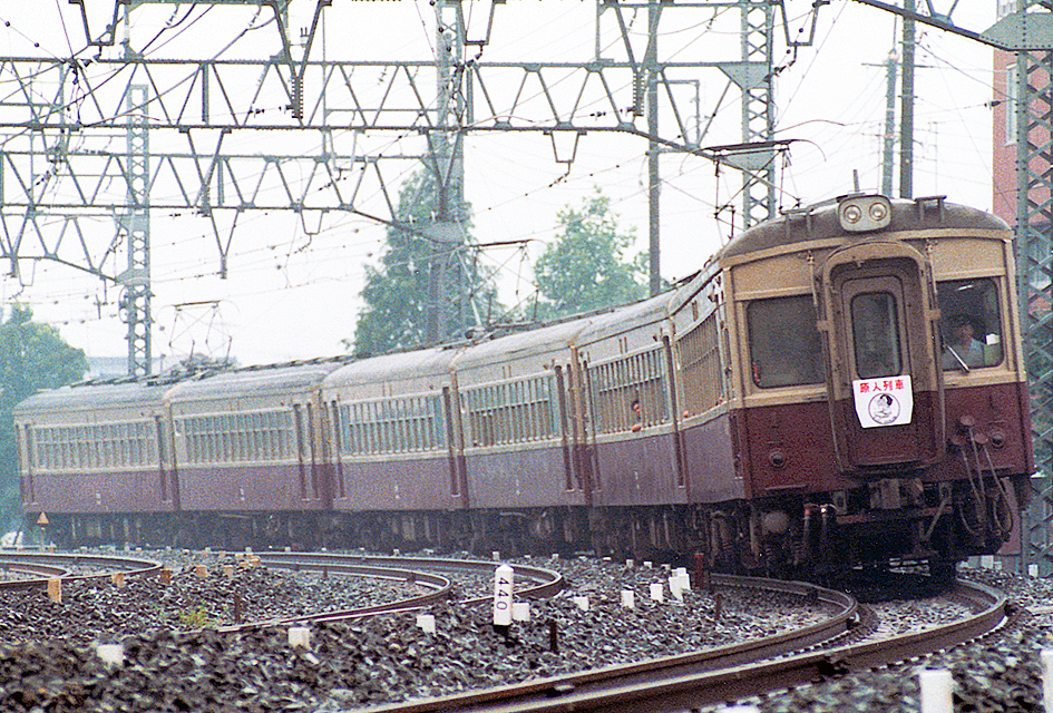 東武鉄道 5700系電車 臨時列車「原人列車」